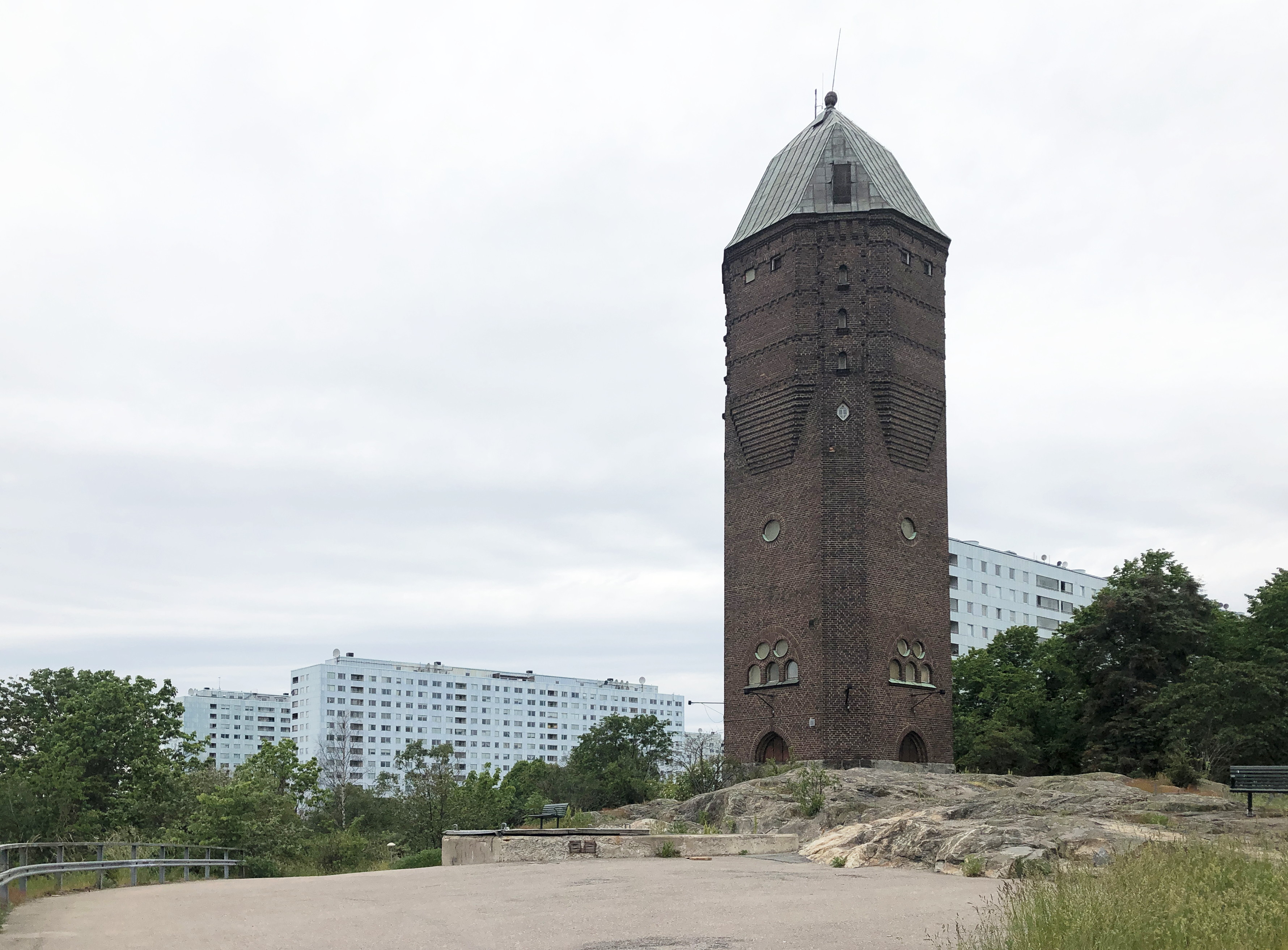 Hagalunds vattentorn, byggnadsår 1911. Arkitekter: Ivar Tengbom och Ernst Torulf